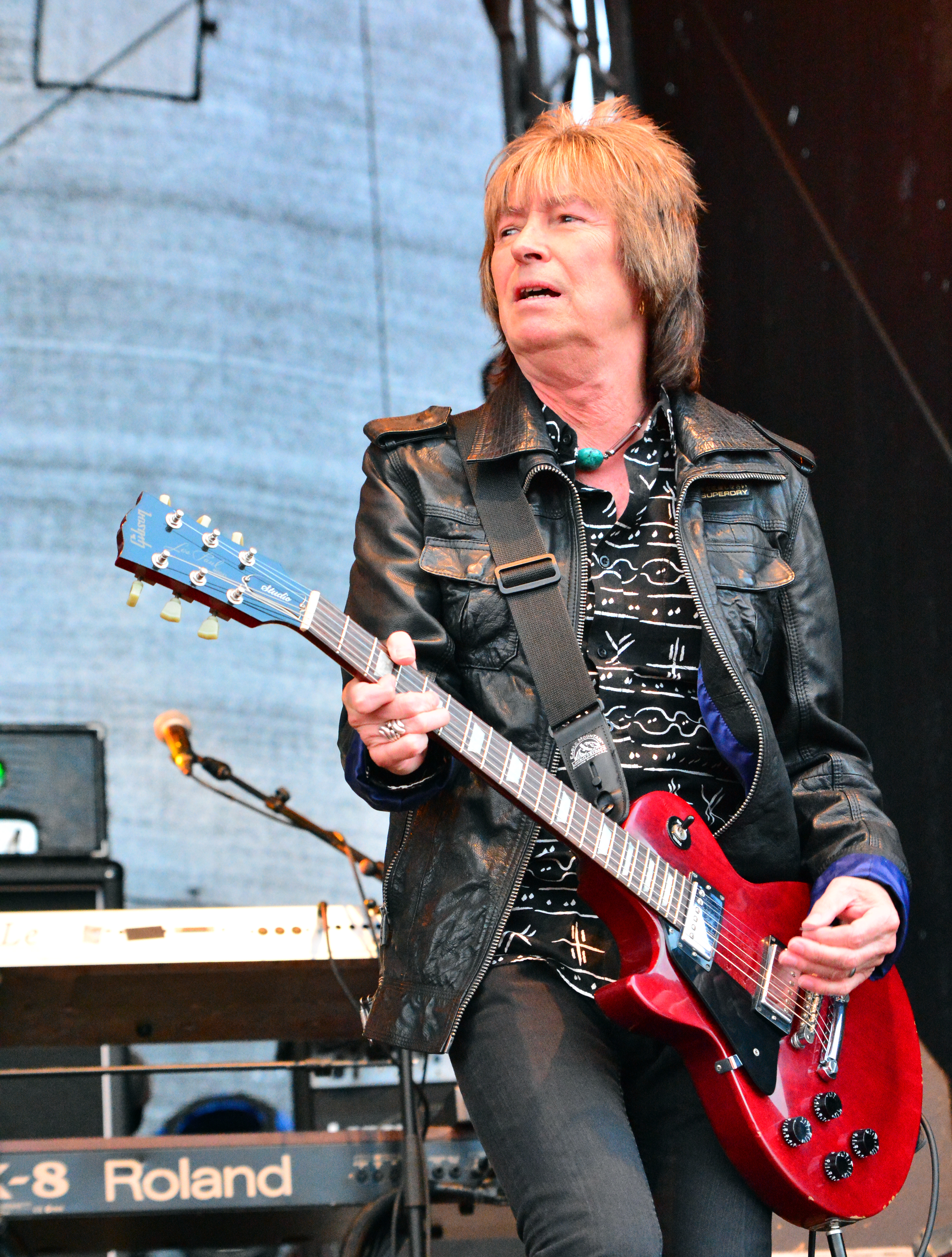 Paul Raymond von UFO bei den „Hamburg Harley Days“